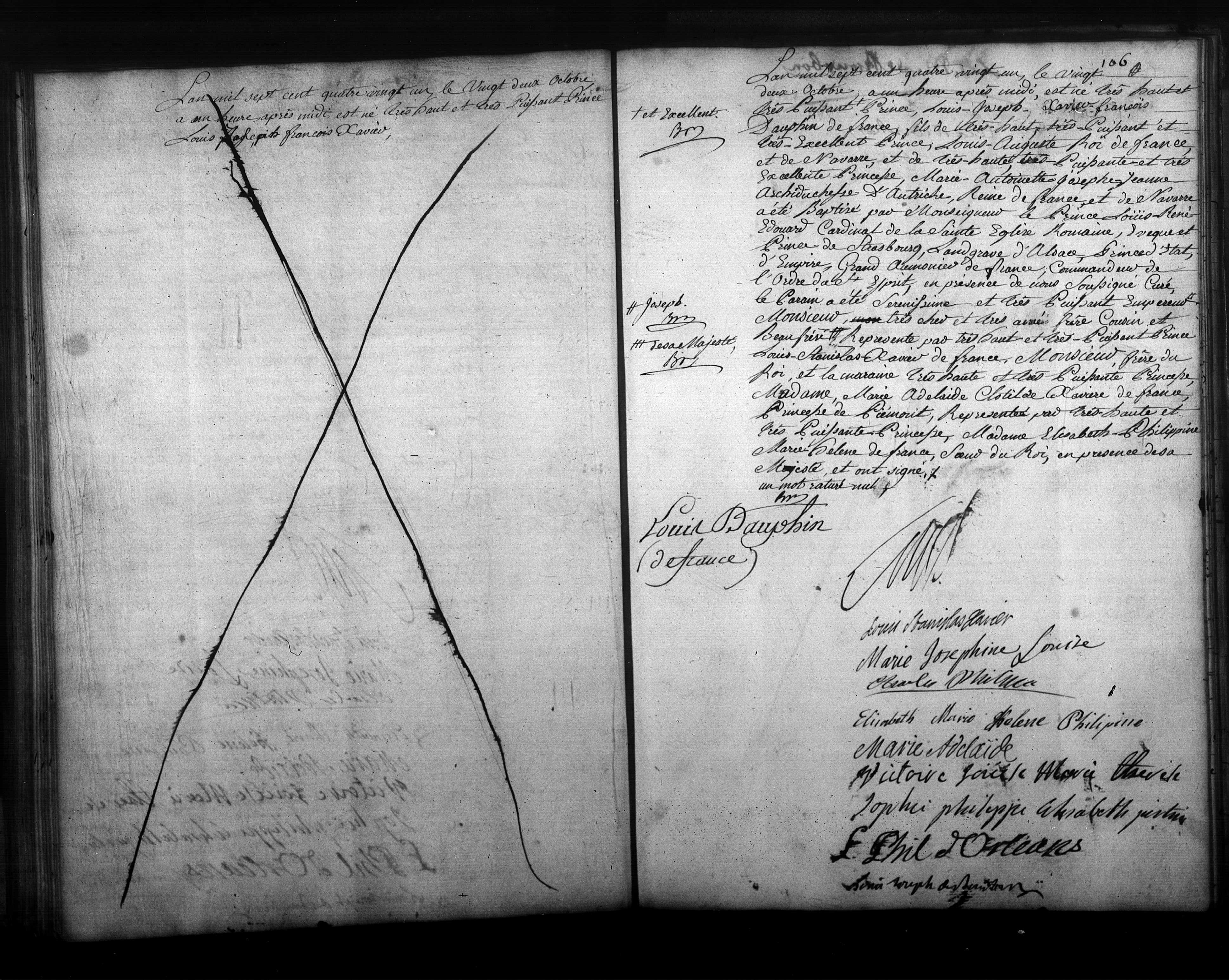 archives Yvelines